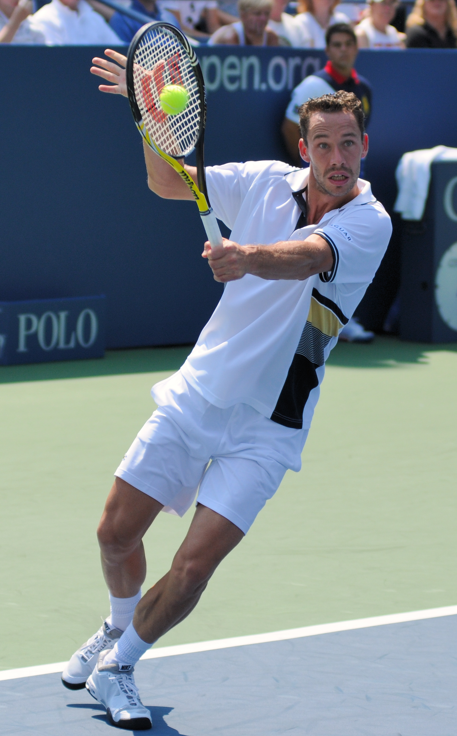 Michael Llodra - US Open 2010